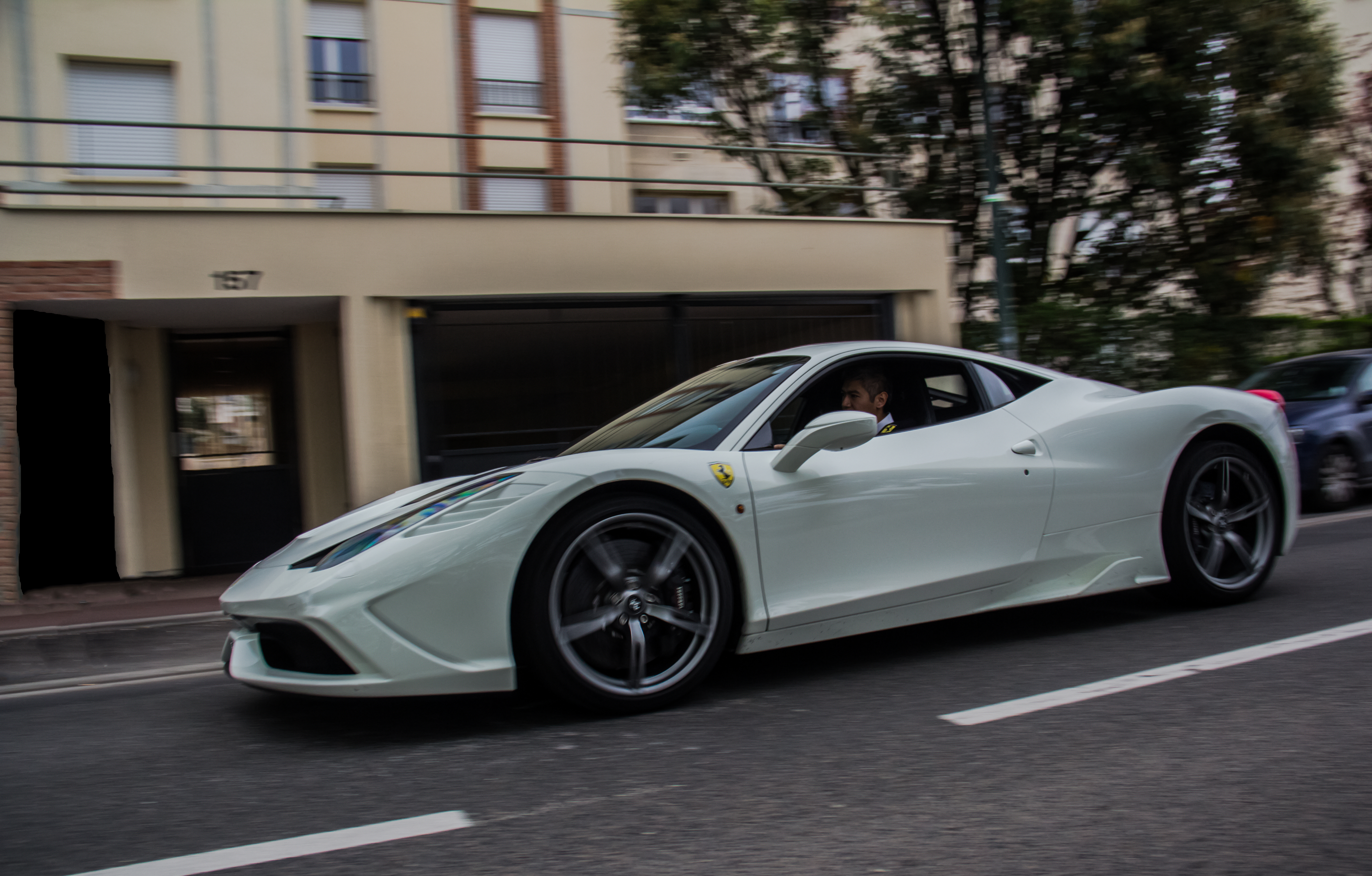 458 Speciale